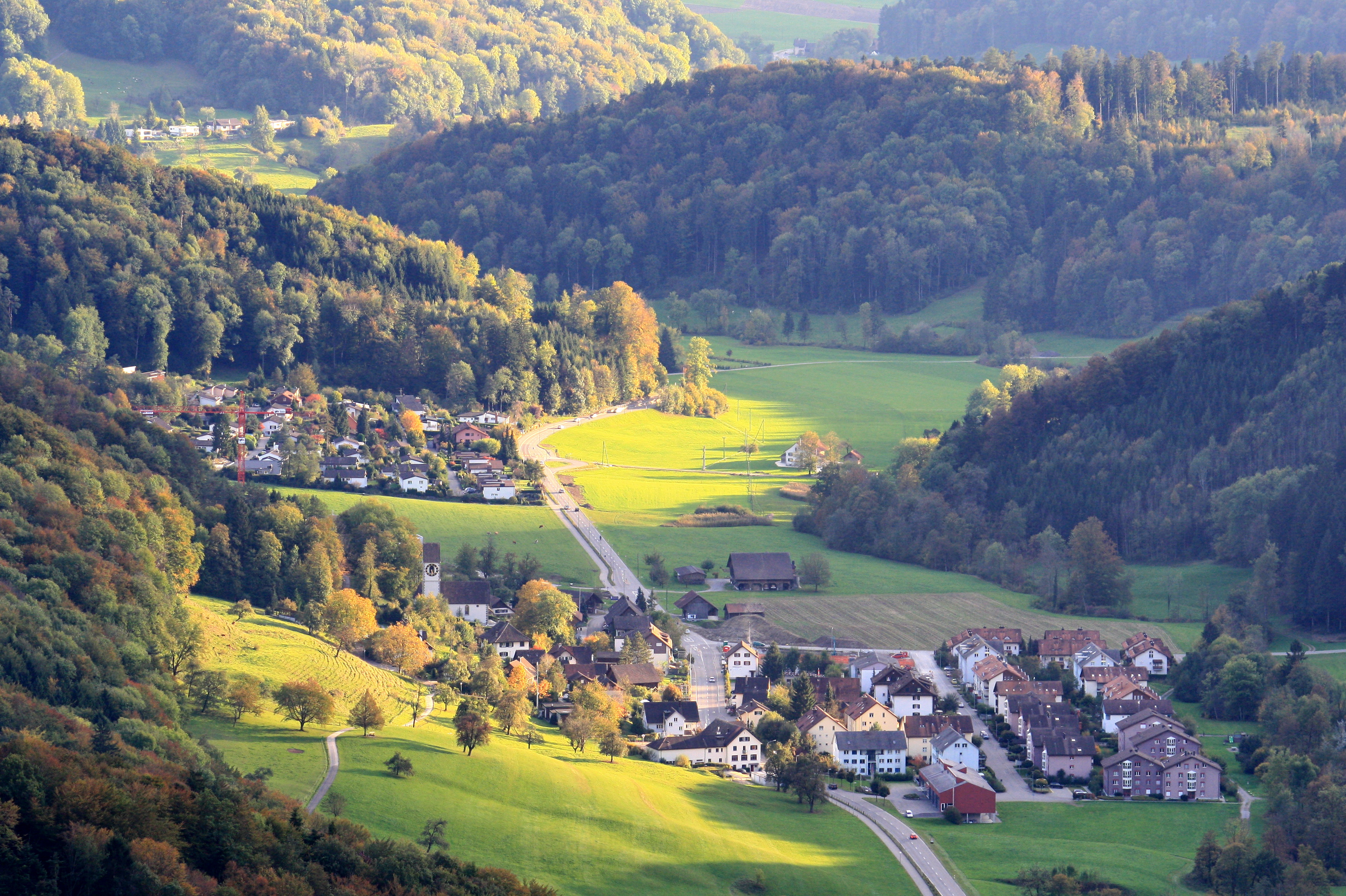 Stallikon as seen from Uetliberg Aussichtsturm